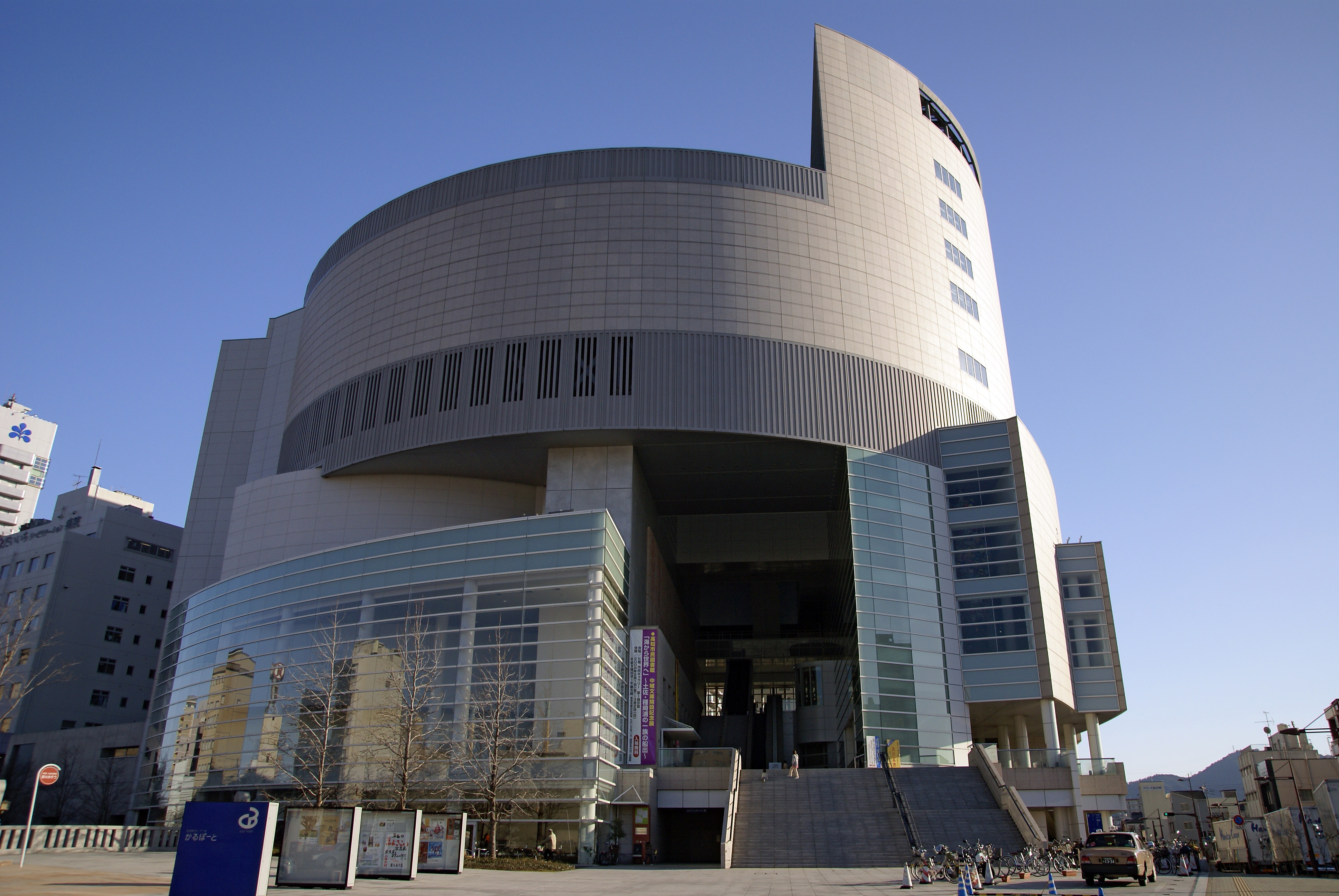 Kochi City Culture-Plaza CUL-PORT in Kochi, Kochi prefecture, Japan